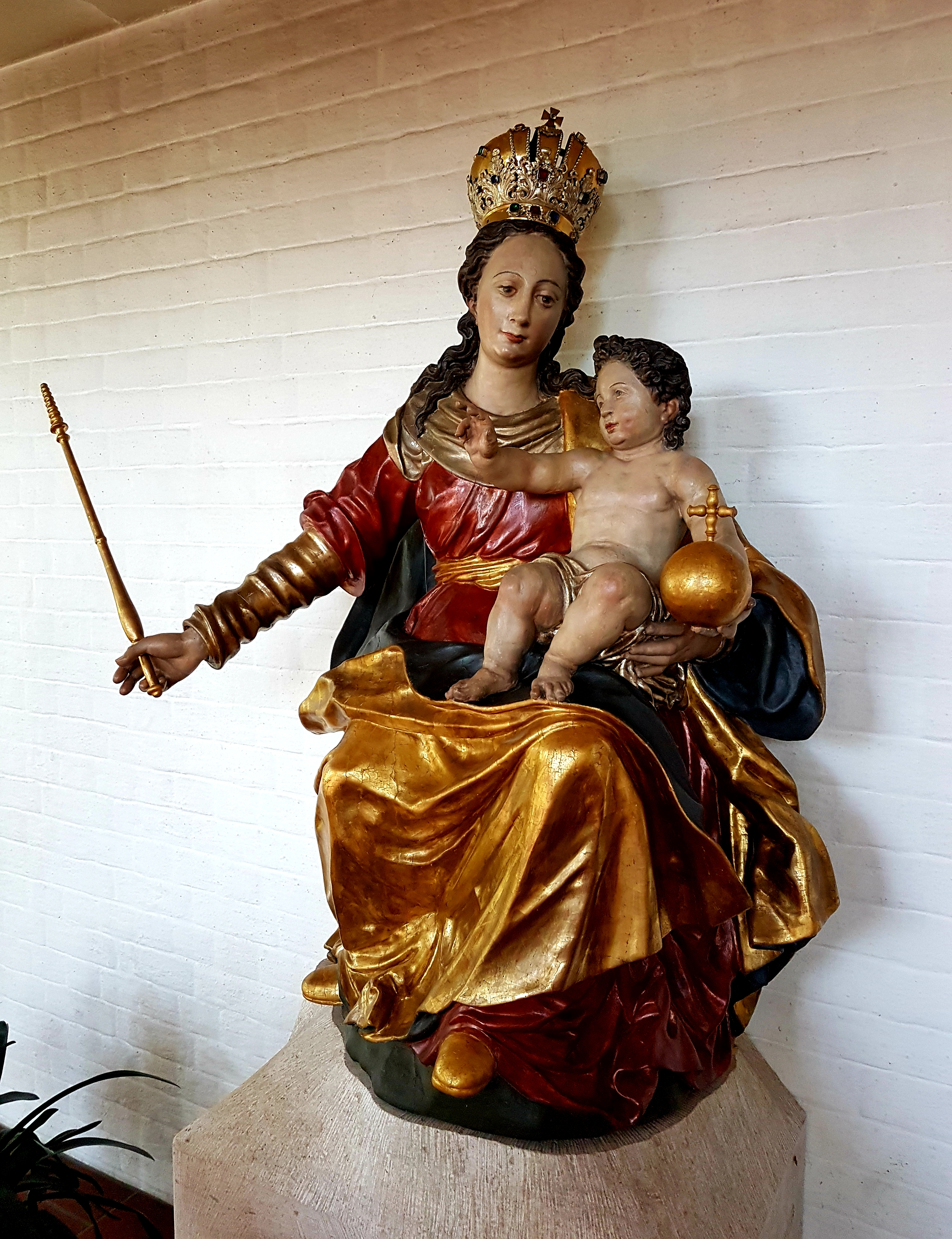 St. Hippolyt (St. Pölten, Weilheim)